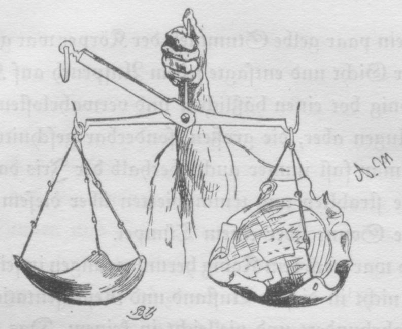 „Tage des Königs“ von Bruno Frank, Erstausgabe von 1924, Vignette von Adolph von Menzel zu dem Kapitel „Der Großkanzler“.